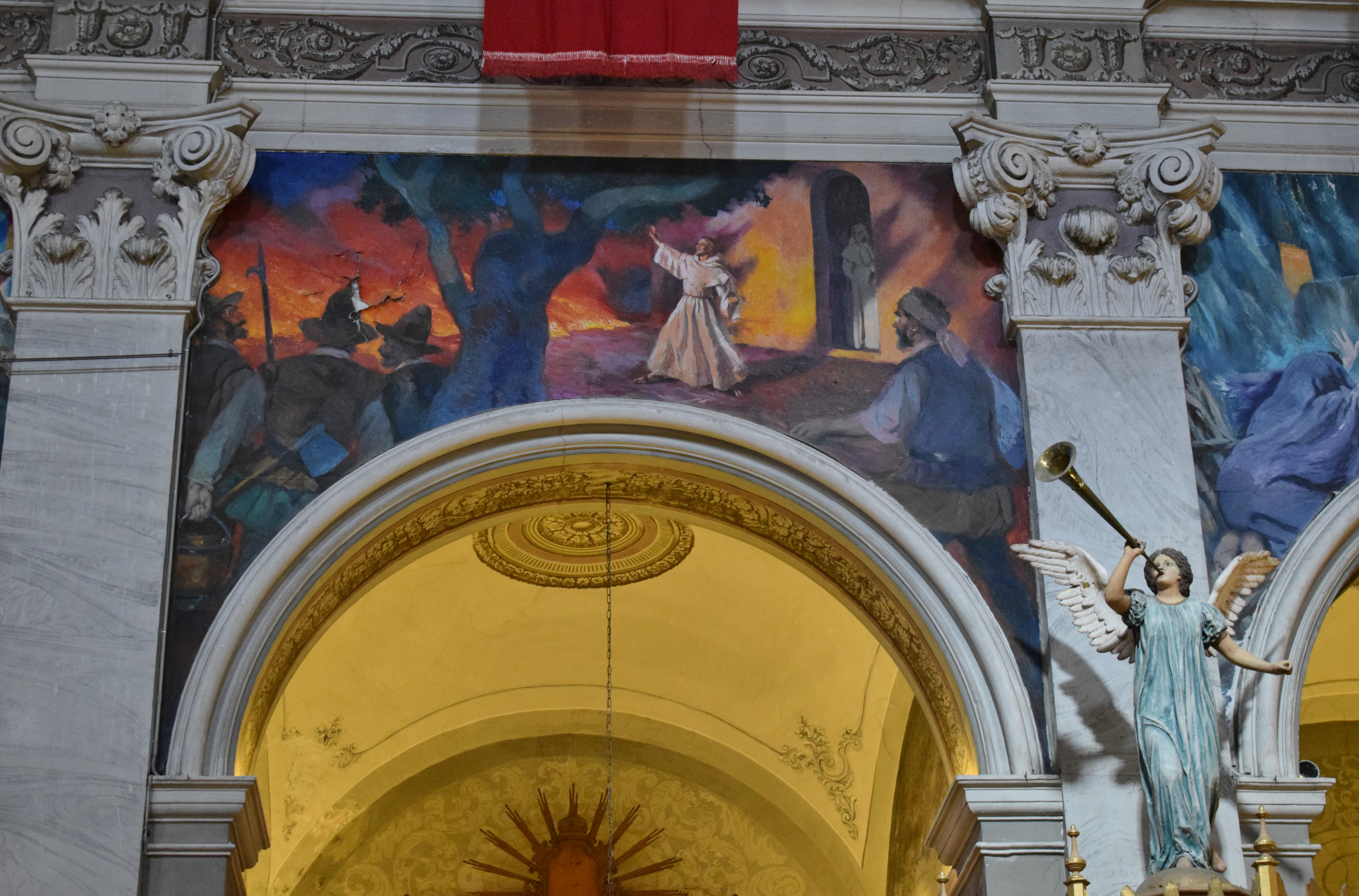 Albaida.